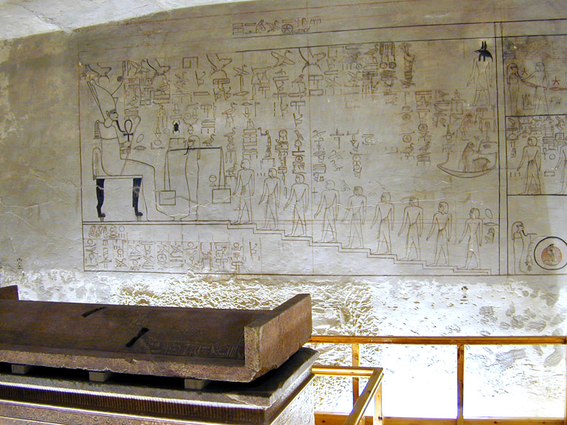 Sur la paroi, évocation de la 5ème division du Livre des Portes : le tribunal d'Osiris. Le sarcophage d'Horemheb est en granit rouge. Les côtés sont ornés des 4 fils d'Horus et d'autres divinités. Les angles du sarcophage sont occupés par les divinités protectrices aux ailes déployées : Isis, Nephthys, Neith et Selkis. Horemheb a été le dernier pharaon de la XVIIIème dynastie. Il a rétabli le culte d'Amon en s'efforçant d'effacer toutes traces du prédécesseur de Toutankhamon, son père Aménophis IV : Akhénaton.